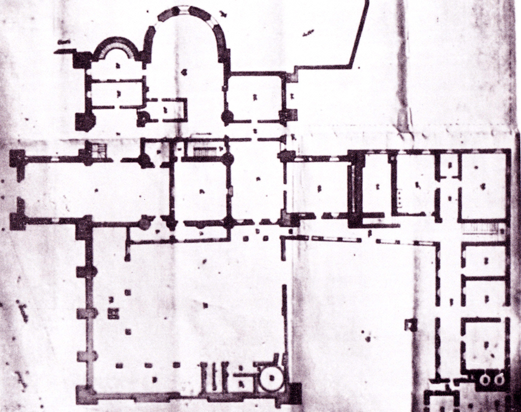 Pianta della cattedrale di Santa Maria di Lodi Vecchio